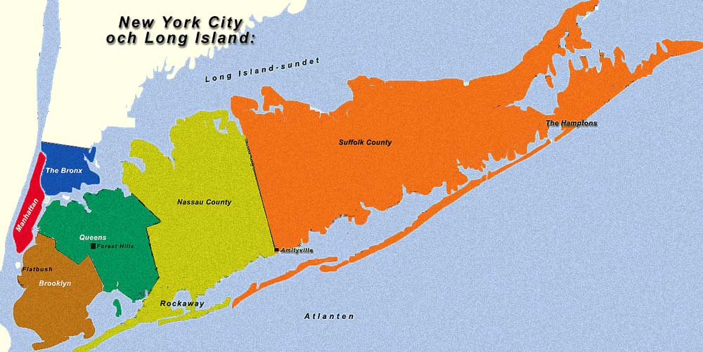 Karta över Long Island och NYC